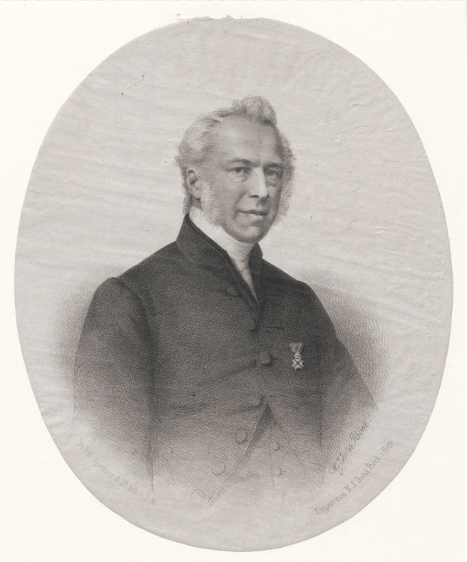 Portret van Theodoor Cornelis Reinier Huydecoper (1805-1866), oprichter van de Nederlandsche Vereeniging tot Afschaffing van Sterken Drank